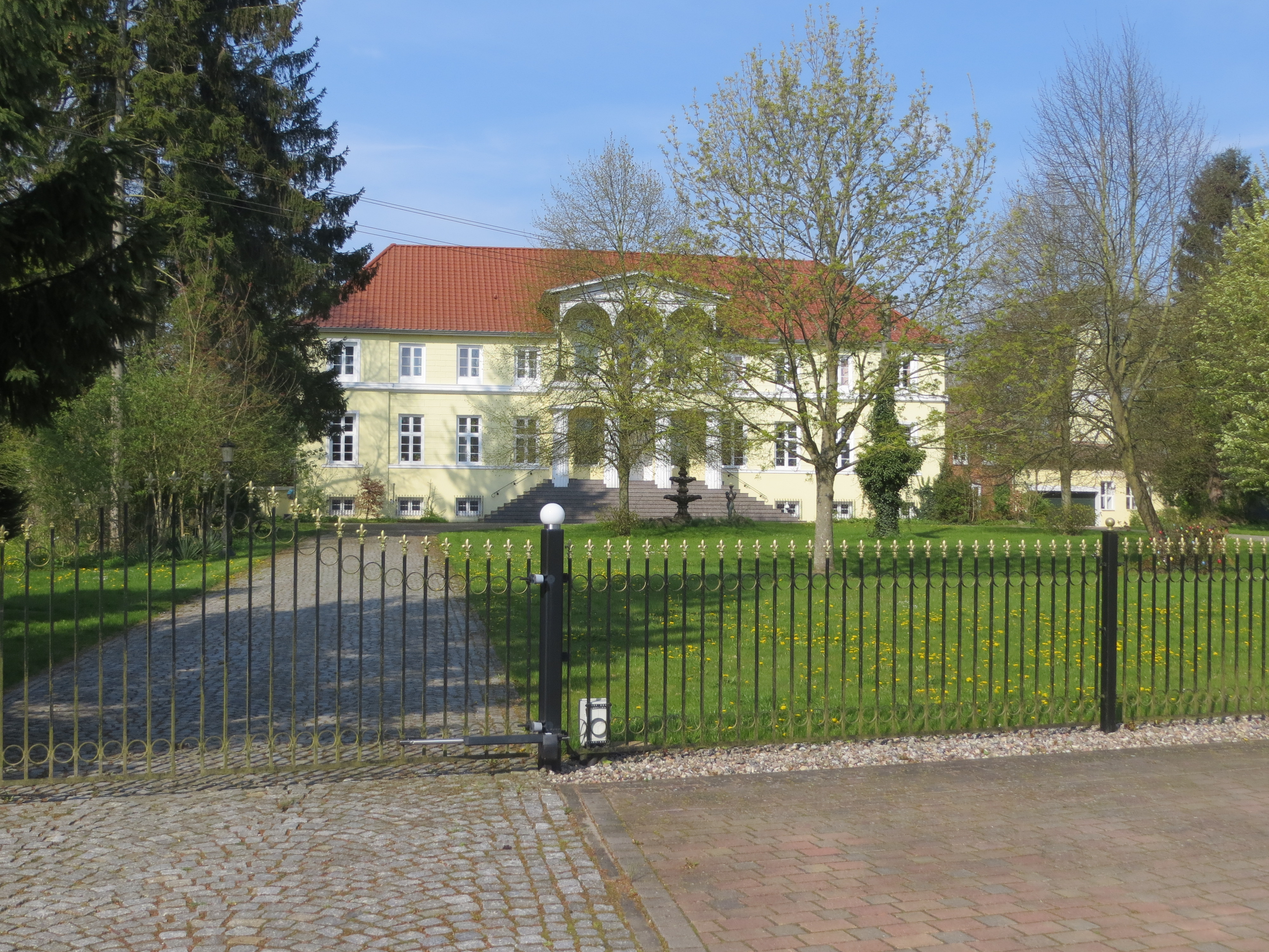 Schossin, historisches Gutshaus mit Teil des Gutsparks